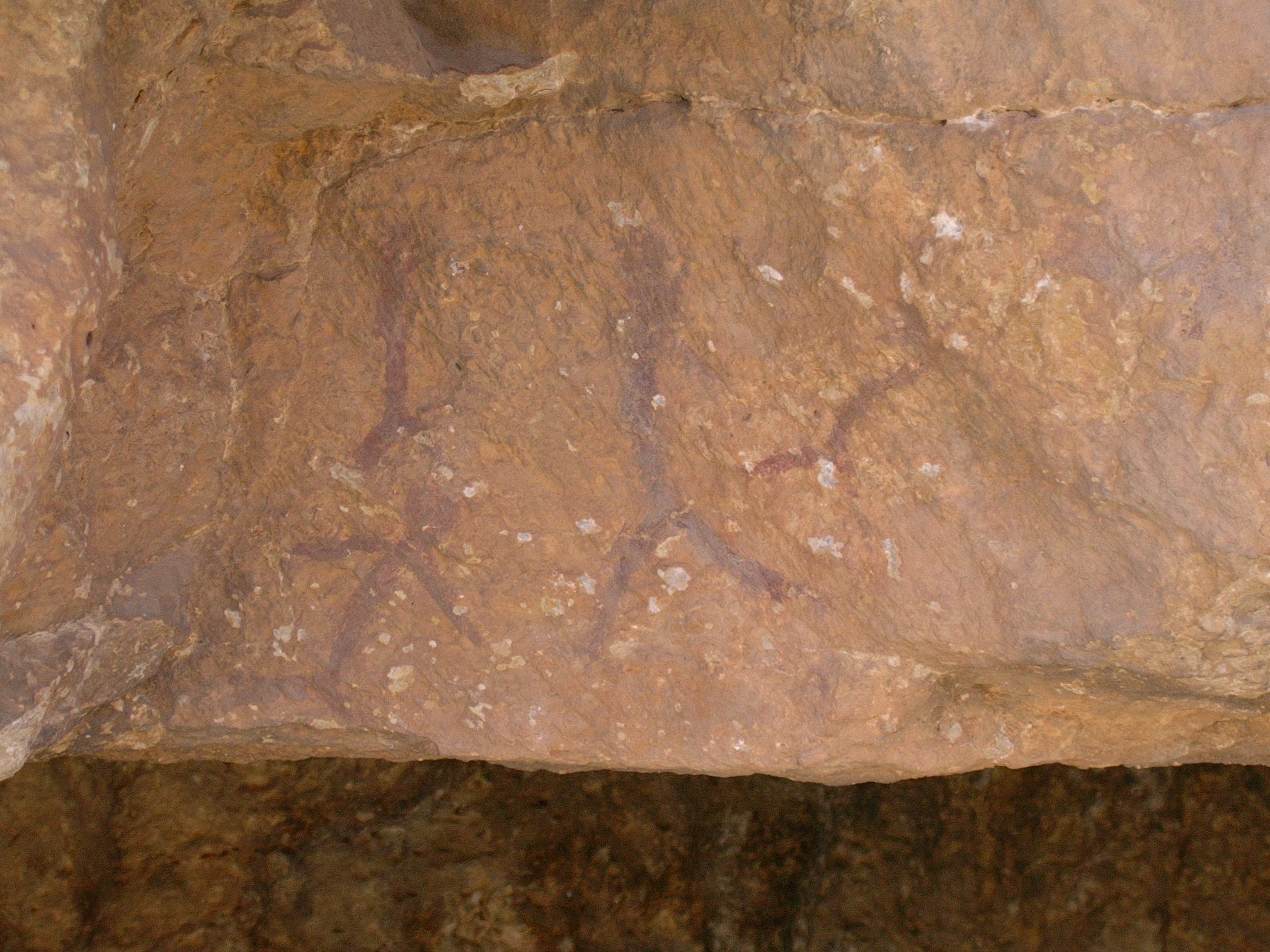 Imatge de les pintures rupestres